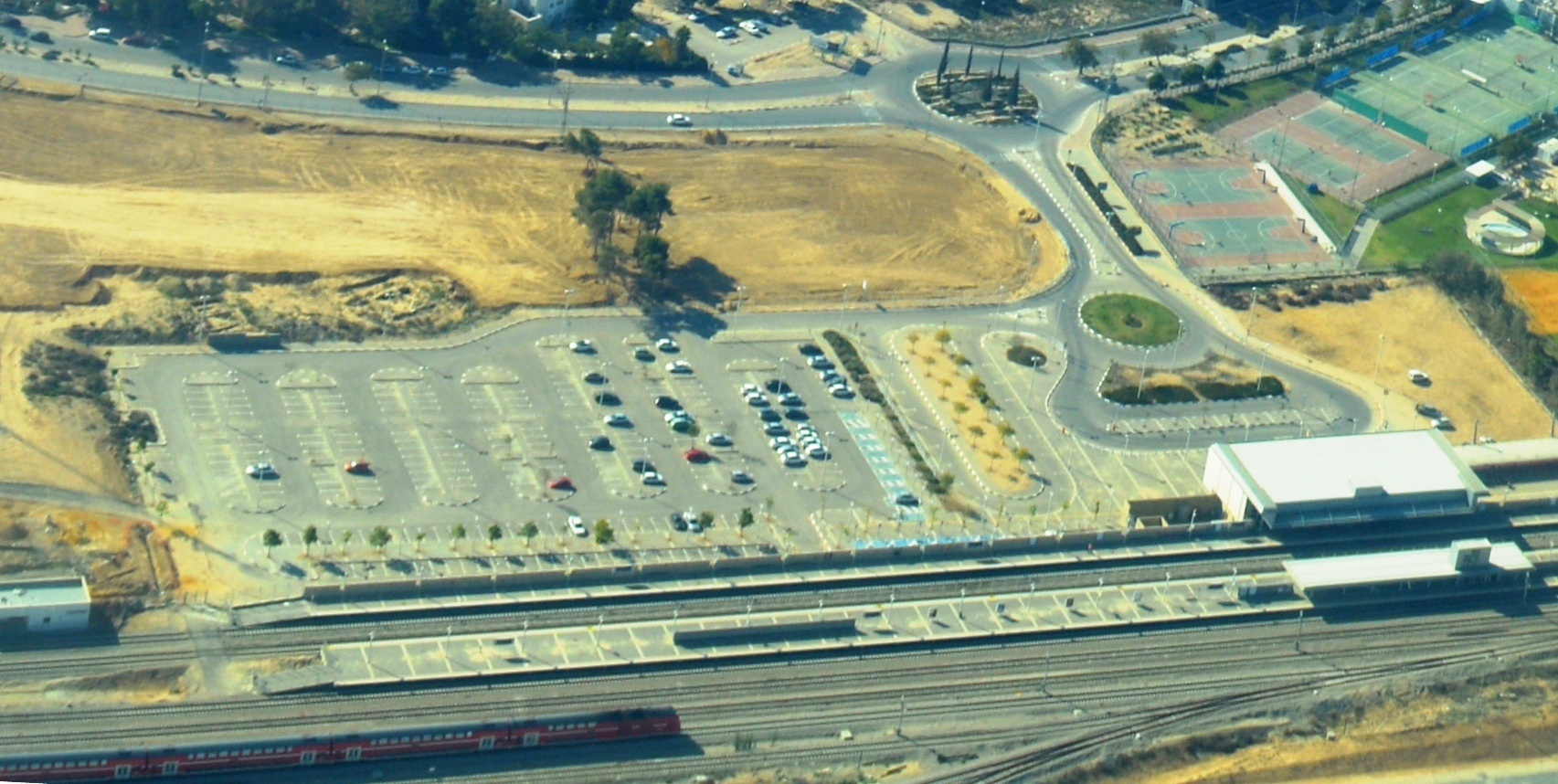 צילום אוויר - תחנת הרכבת באר שבע צפון